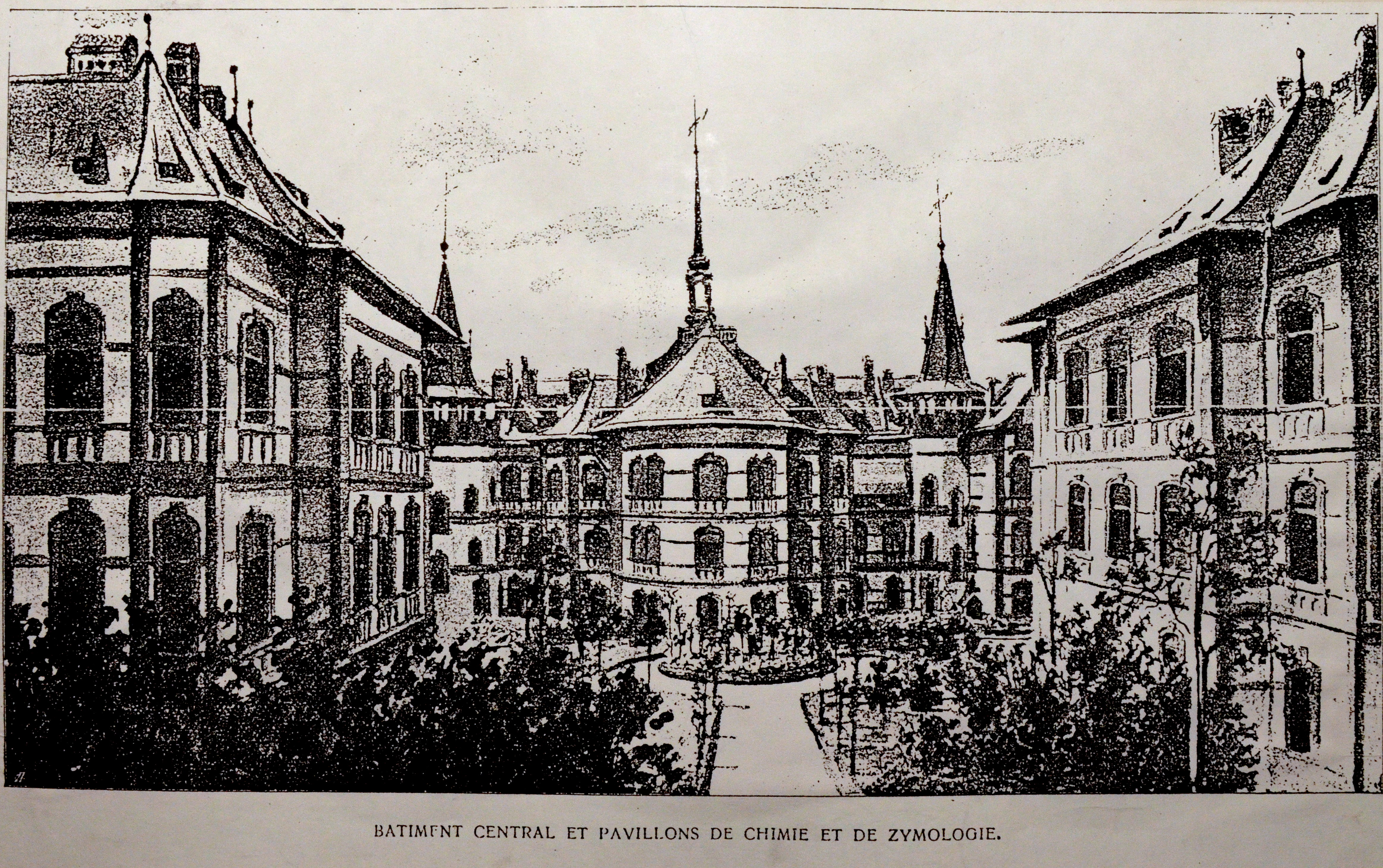 A Herman Ottó úti mezőgazdasági kutatótelep képe megépülte után, Budapest, Herman Ottó út 15. (1907)